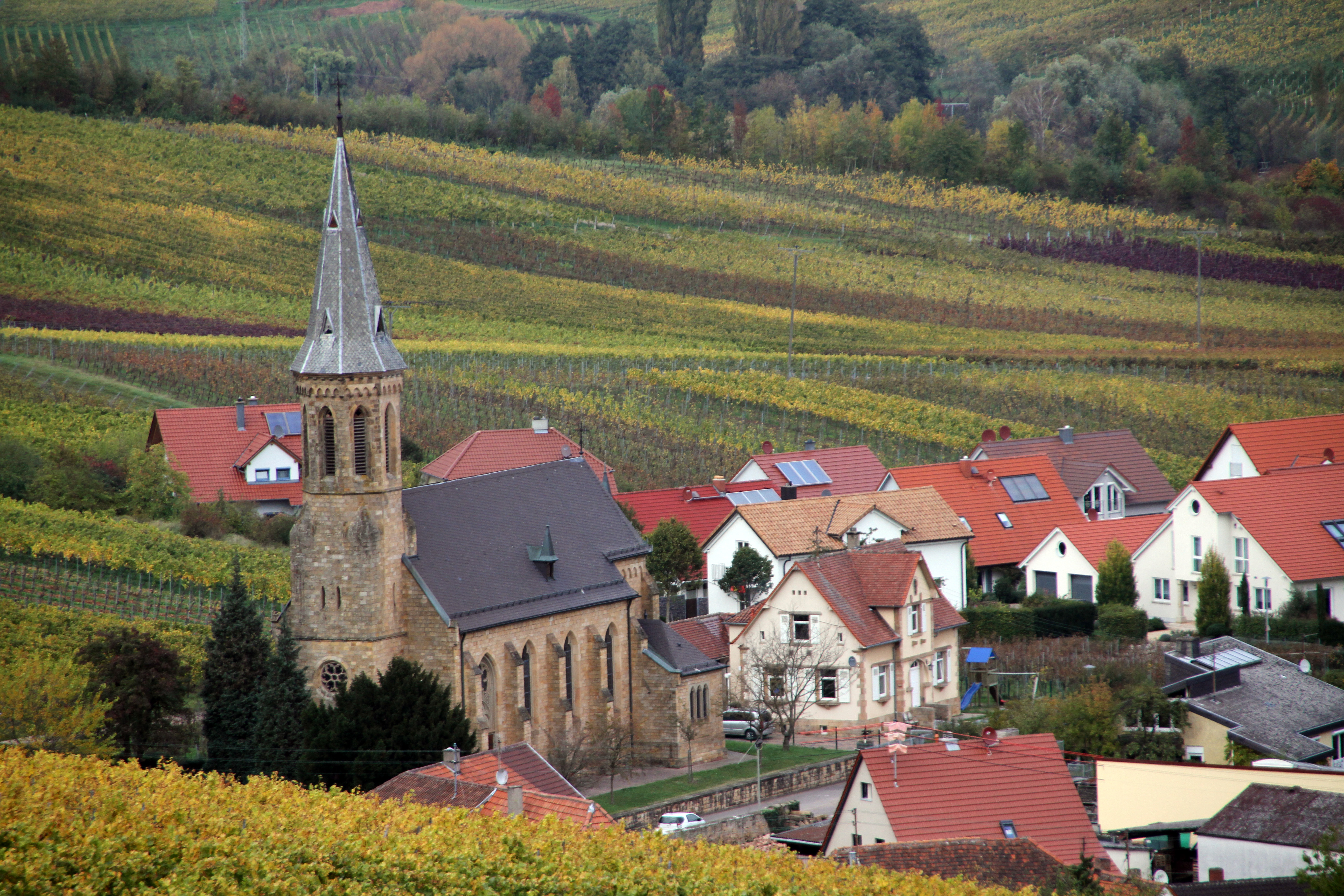 Birkweiler, Am Daschberg 1; katholische Kirche St. Bartholomäus; neugotischer Saalbau, Sandsteinquader, 1896.